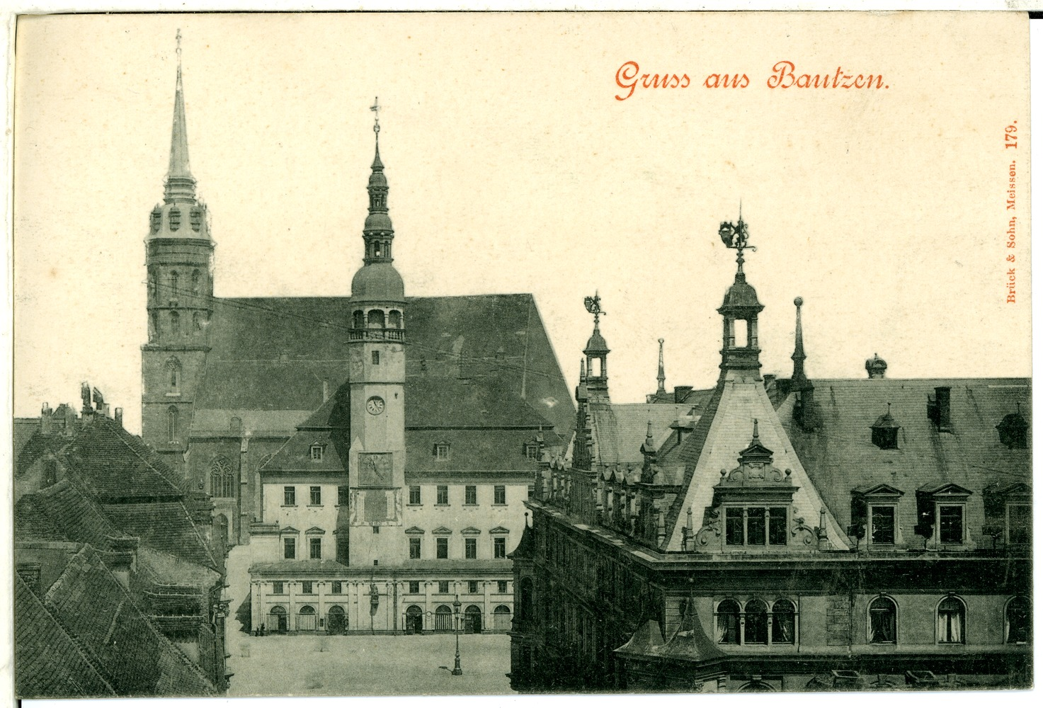 Bautzen; Dom This postcard is from publisher Brück & Sohn in Meißen ( This postcard has a unique number 00179 and is available in a higher resolution at the publisher. This images was uploaded in a cooperation project between Wikipedians and the publisher.